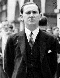 Telesforo Monzon 1934an (behetik laburtua)